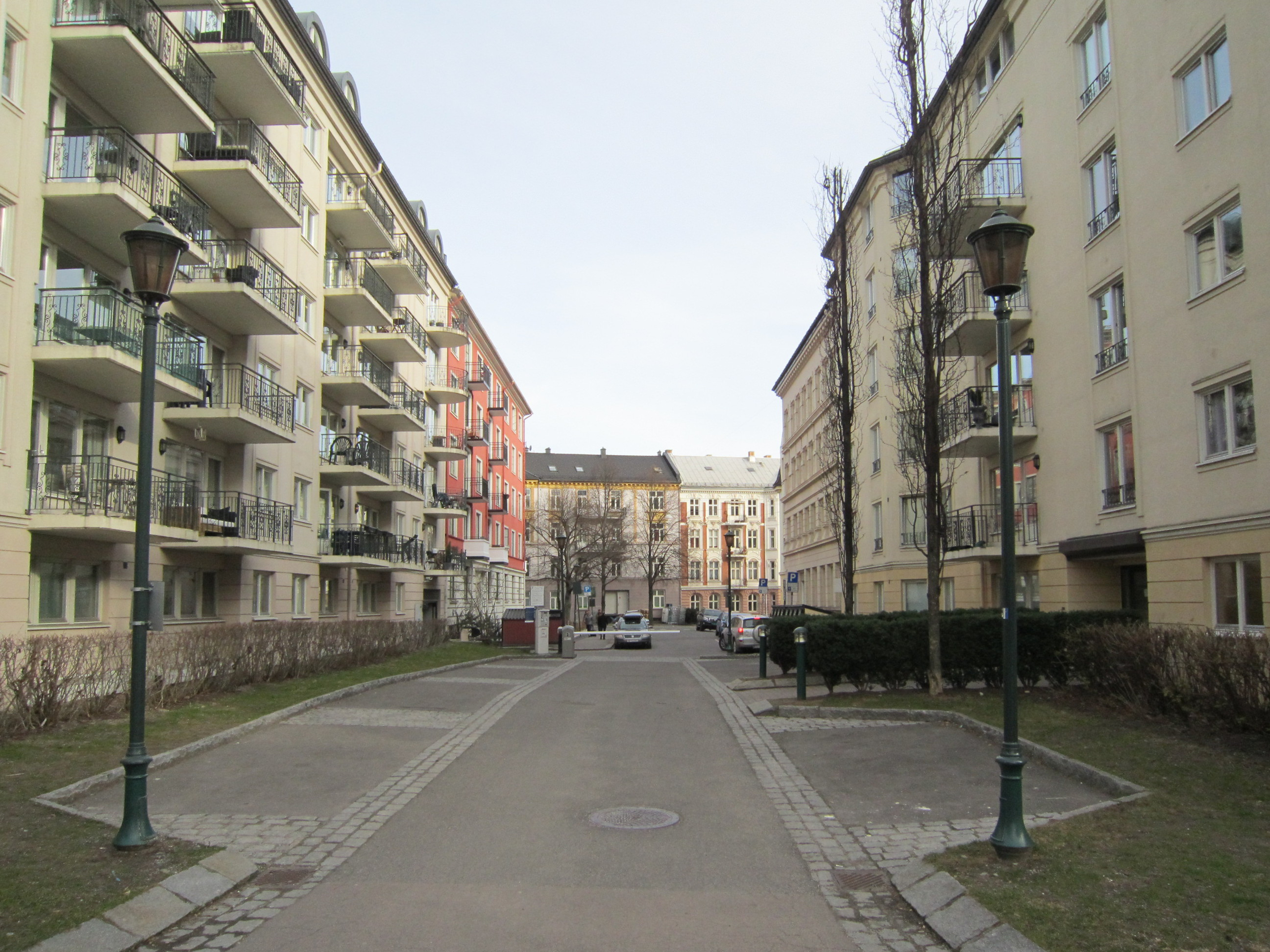 Lindemans gate på Frogner i Oslo